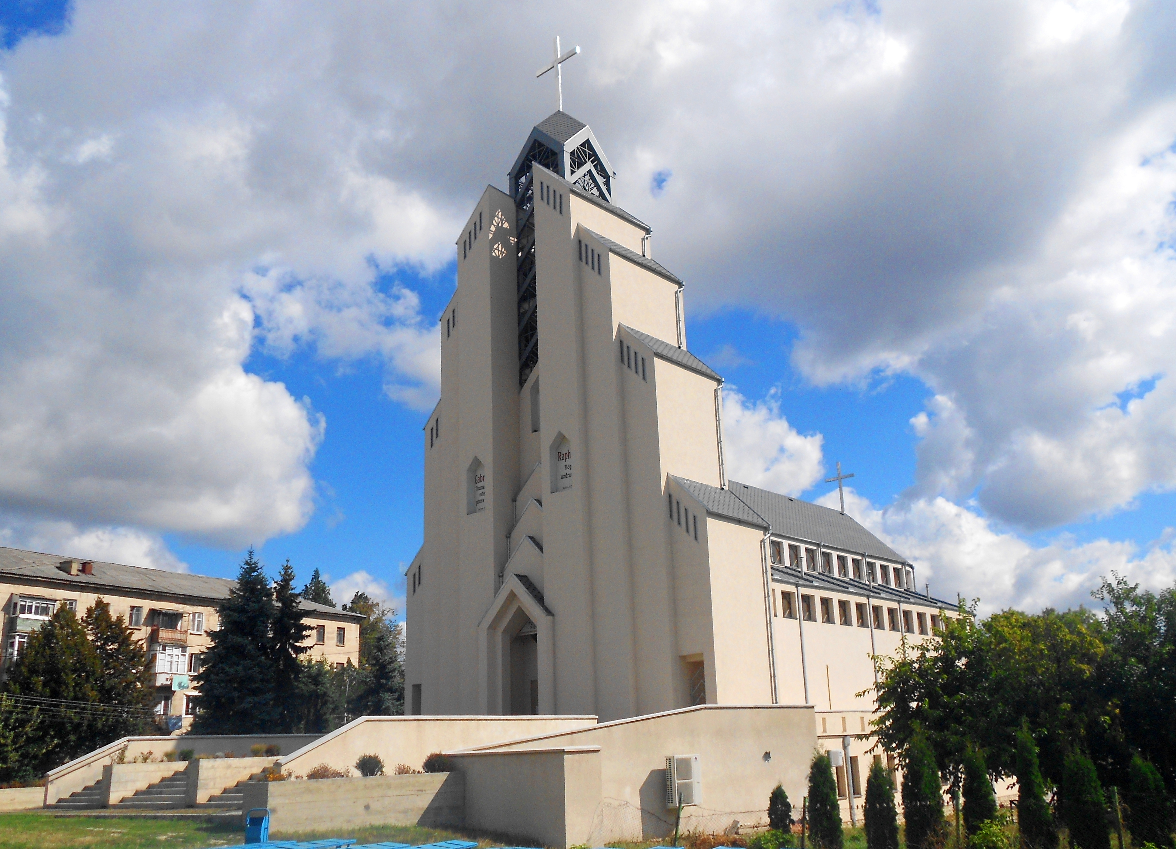 Biserica Romano-Catolică din Bălți